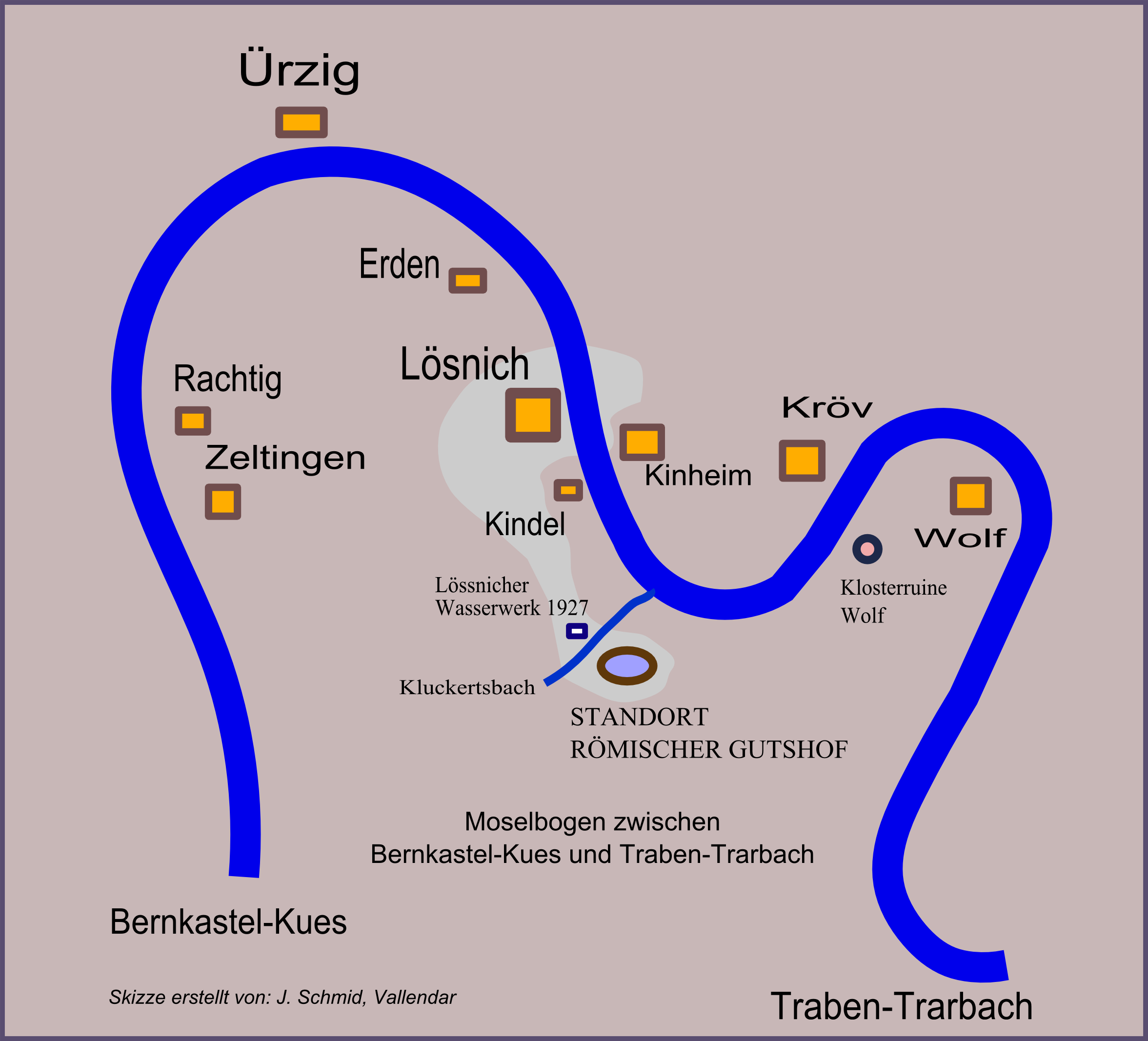 Skizze zur Beschreibung des geographischen STandorts des Römischen Gutshofs bei Lösnich.